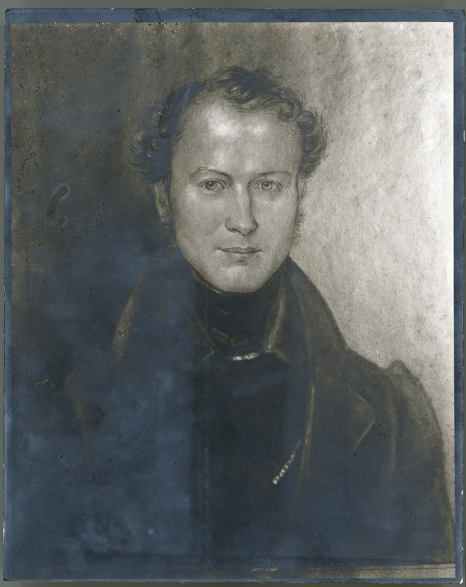 Уильям Данлоп Брейкенридж (1810-1893) - шотландский садовник и ботаник в возрасте 20 лет.